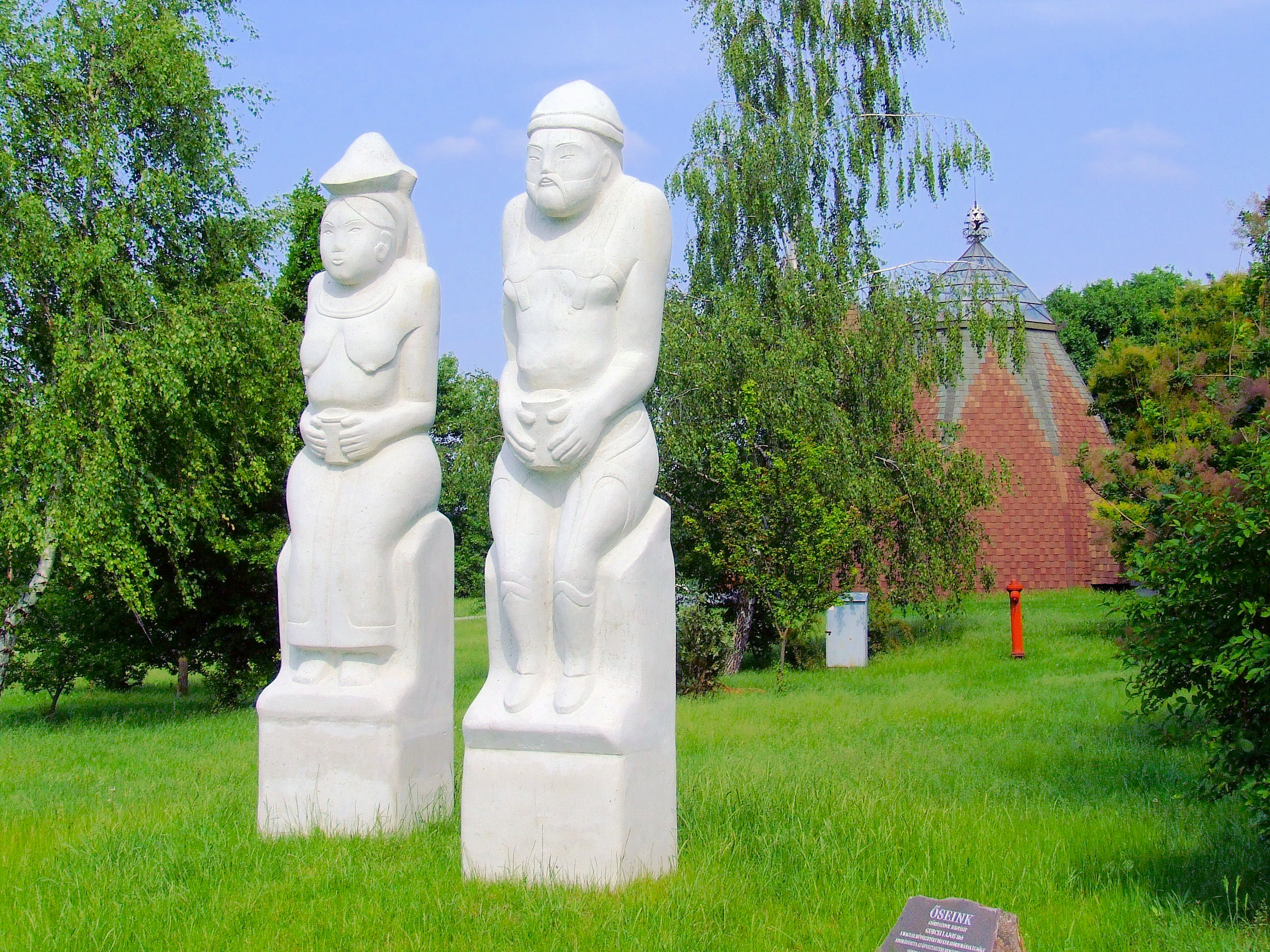 „Ősink“. Ópusztaszeri Nemzeti Történeti Emlékpark. Gubcsi Lajos író adományozta az emlékparknak „Hun, magyar és kun népünk szeretett emlékére“ 2006-ban (Györfi Sándor alkotása)